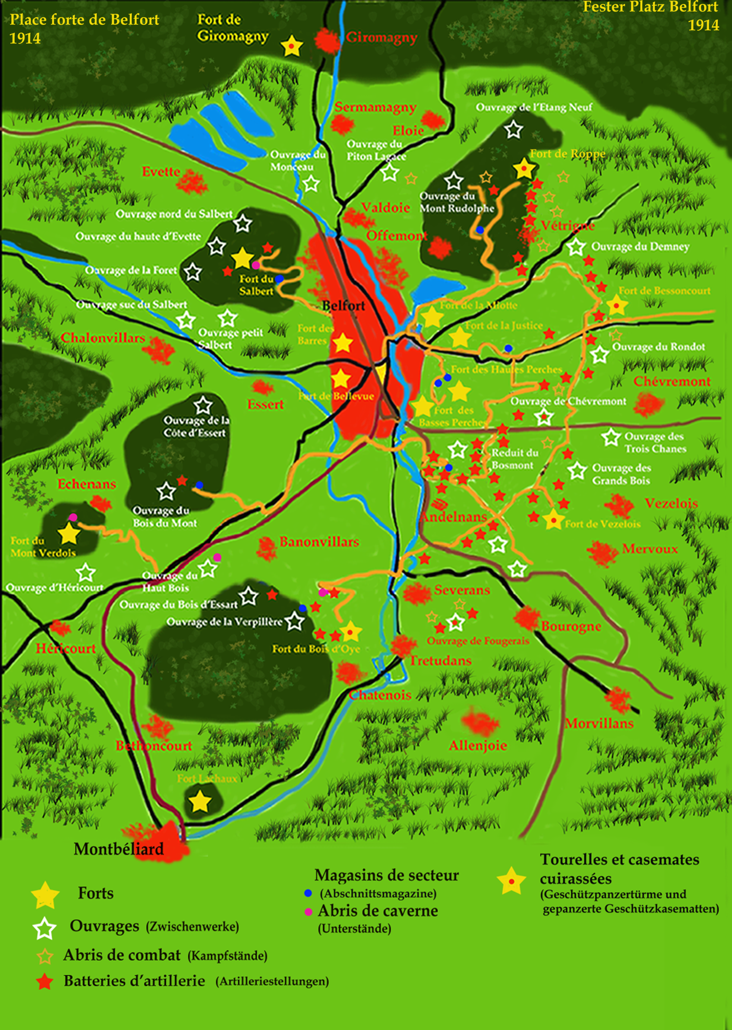 Plan des Festen Platzes Belfort 1914